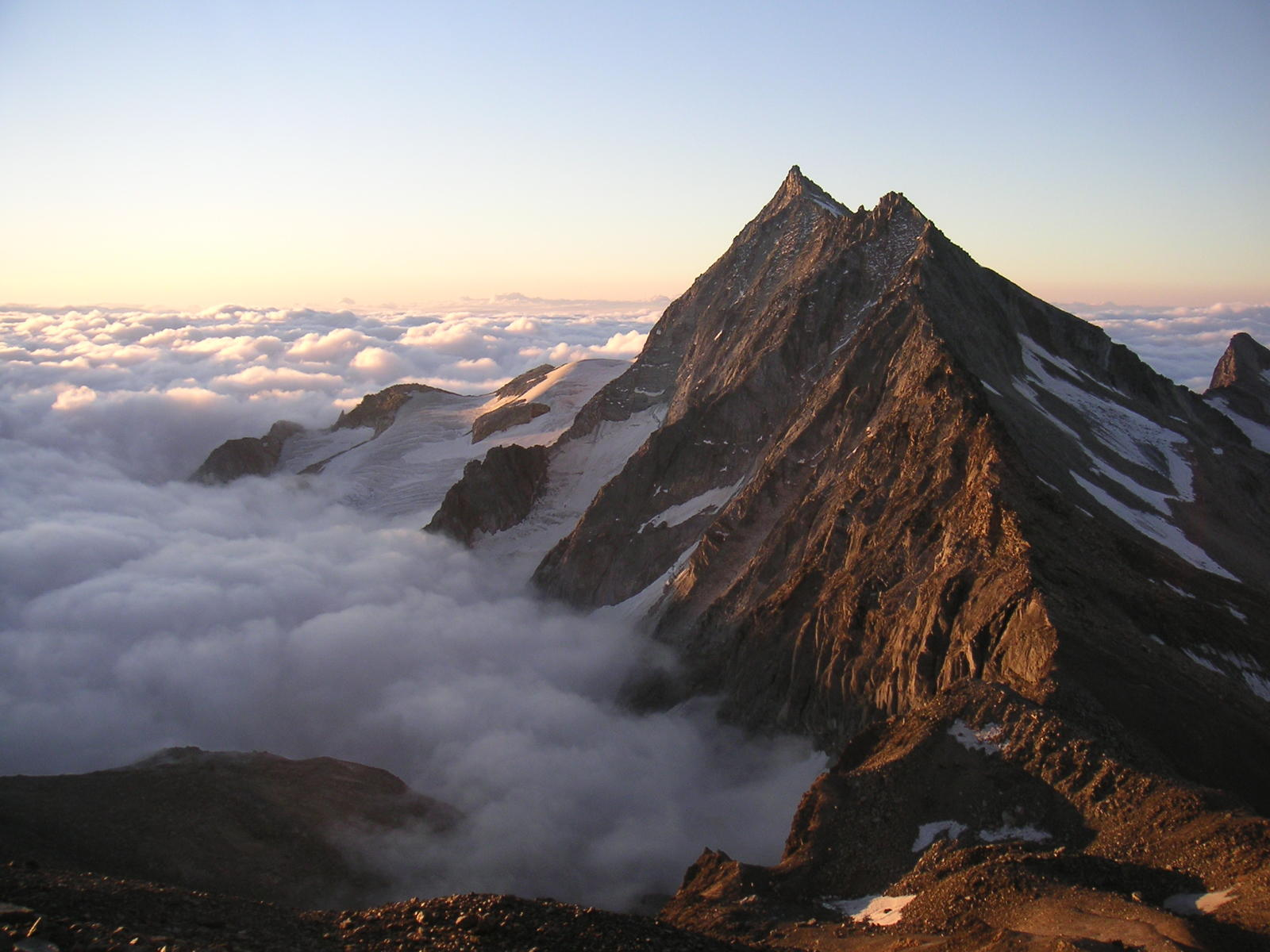 Zwischbergenpass, Portjenhorn und Pizzo d'Andolla im Morgenlicht vom Südgrat des Weissmies aus fotografiert. 16.09.2007, Selbst fotografiert, Oxensepp